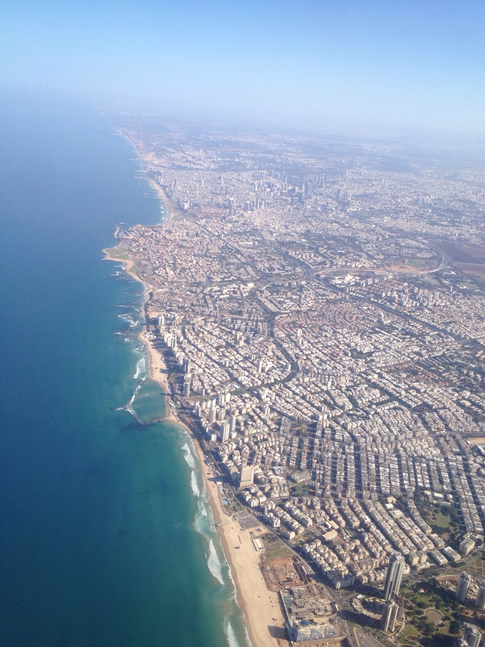 תצלום אווירי של ישראל